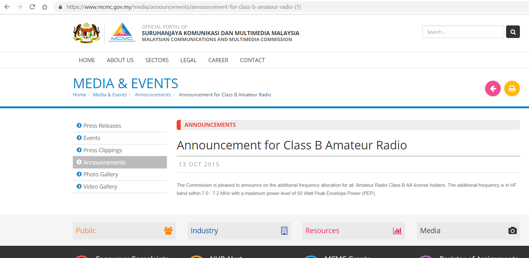 Disiarkan pada 13 Oktober 2015. Tidak dijelaskan jenis pancaran yang dibenarkan.